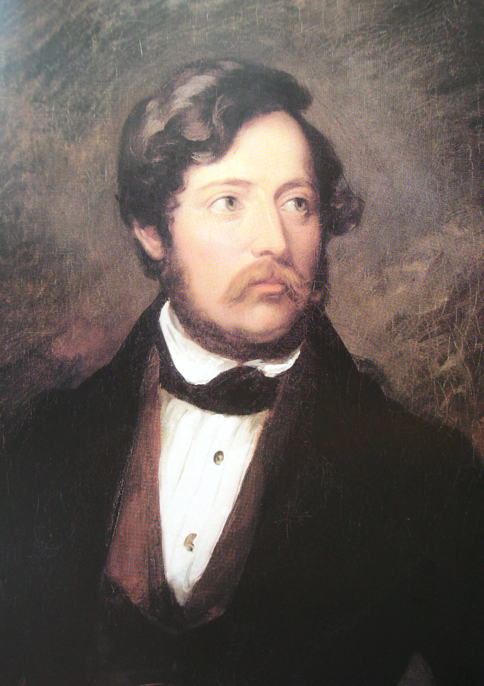 Portrait Jakob Götzenberger (Maler: Louis Krevel) (1834)